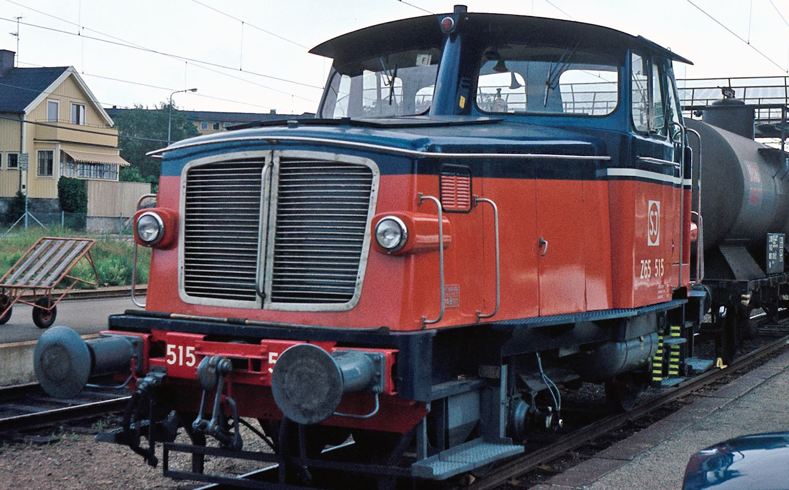 Z65 515 in Schweden